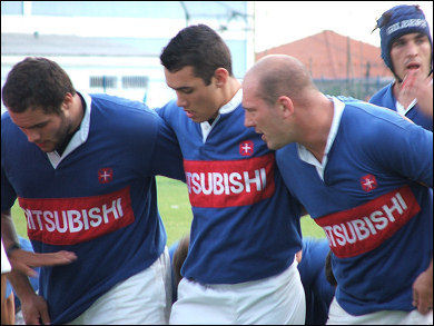 1ª Linha do Belenenses em 2005/2006.